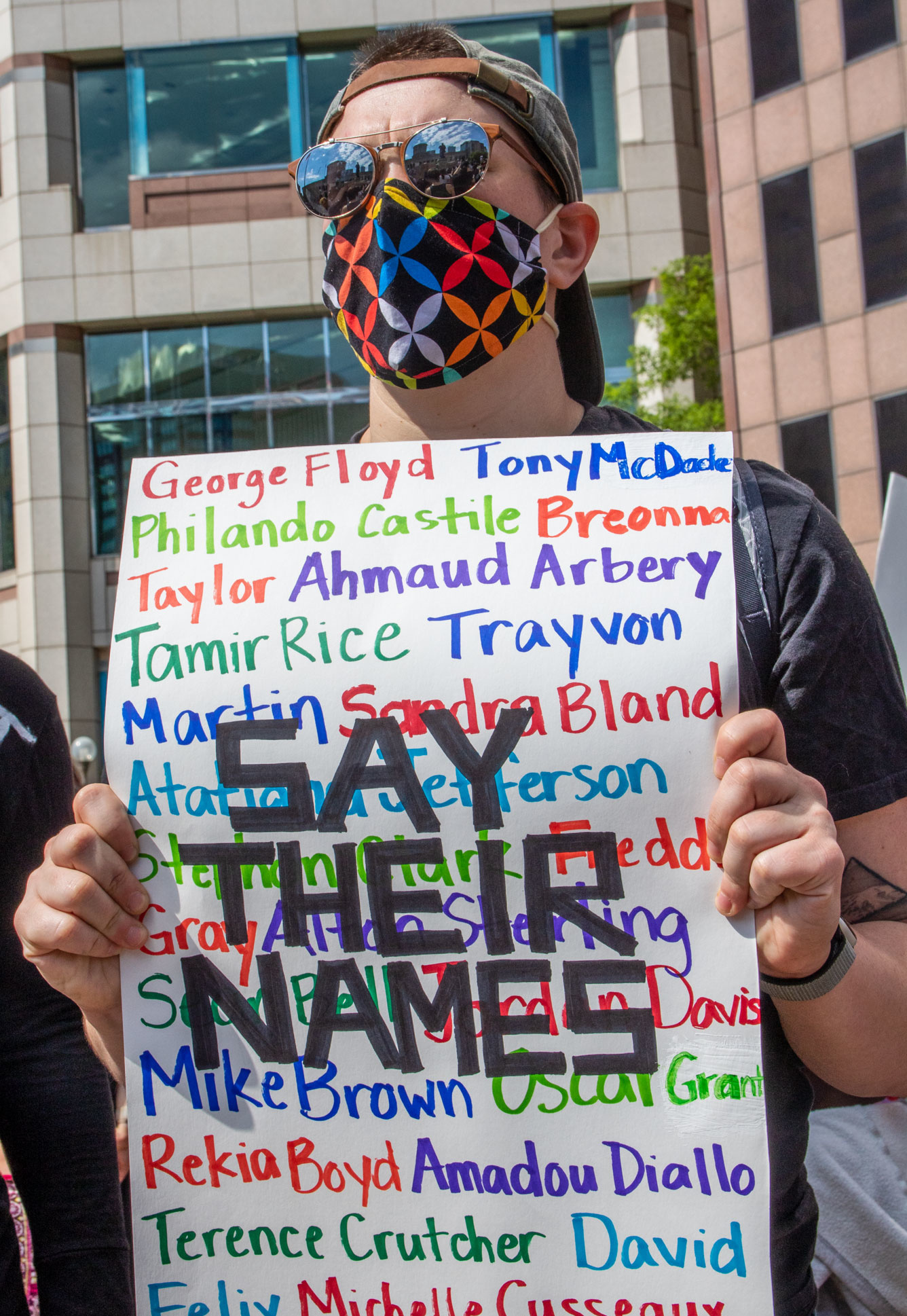 02cIMG_2512